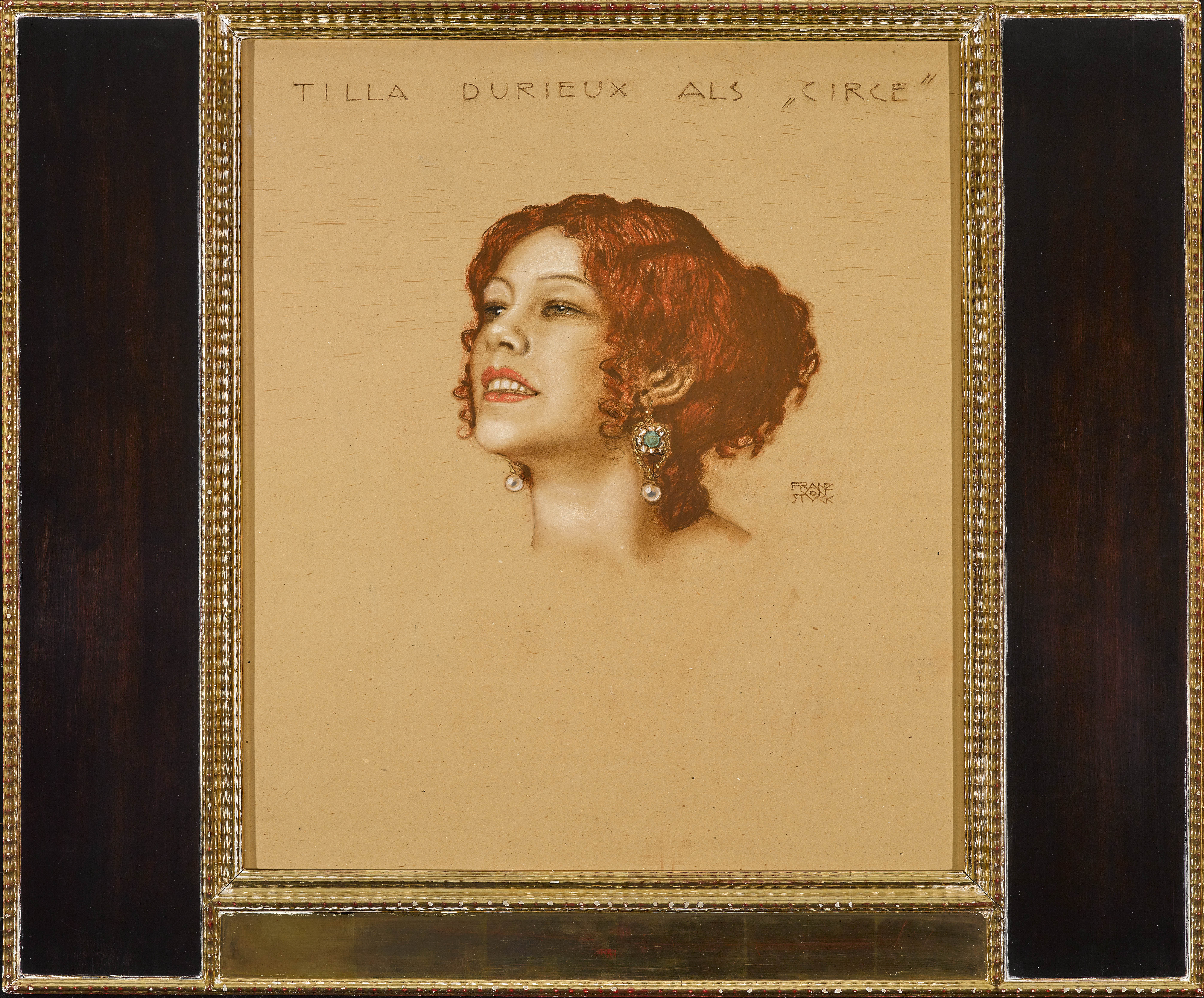 Franz von Stuck: TILLA DURIEUX ALS „CIRCE“. Pastell über Bleistift auf bräunlichem Malkarton, 55 × 48 cm, rechts mittig signiert.